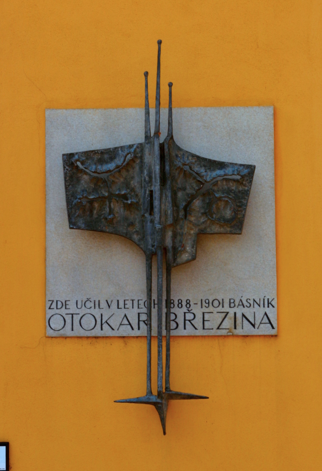 Nová Říše radnice